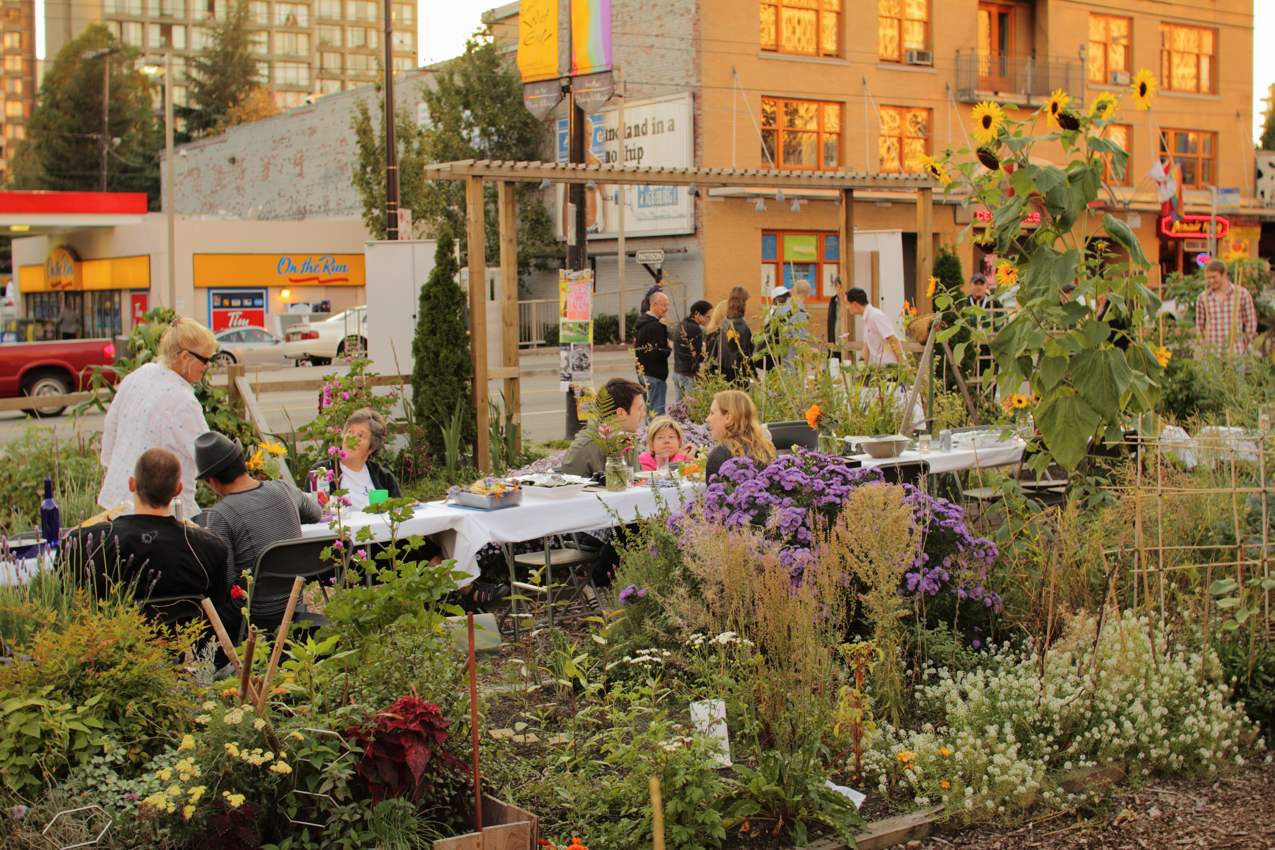 Vancouver, BC